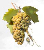 Cépage malvasia